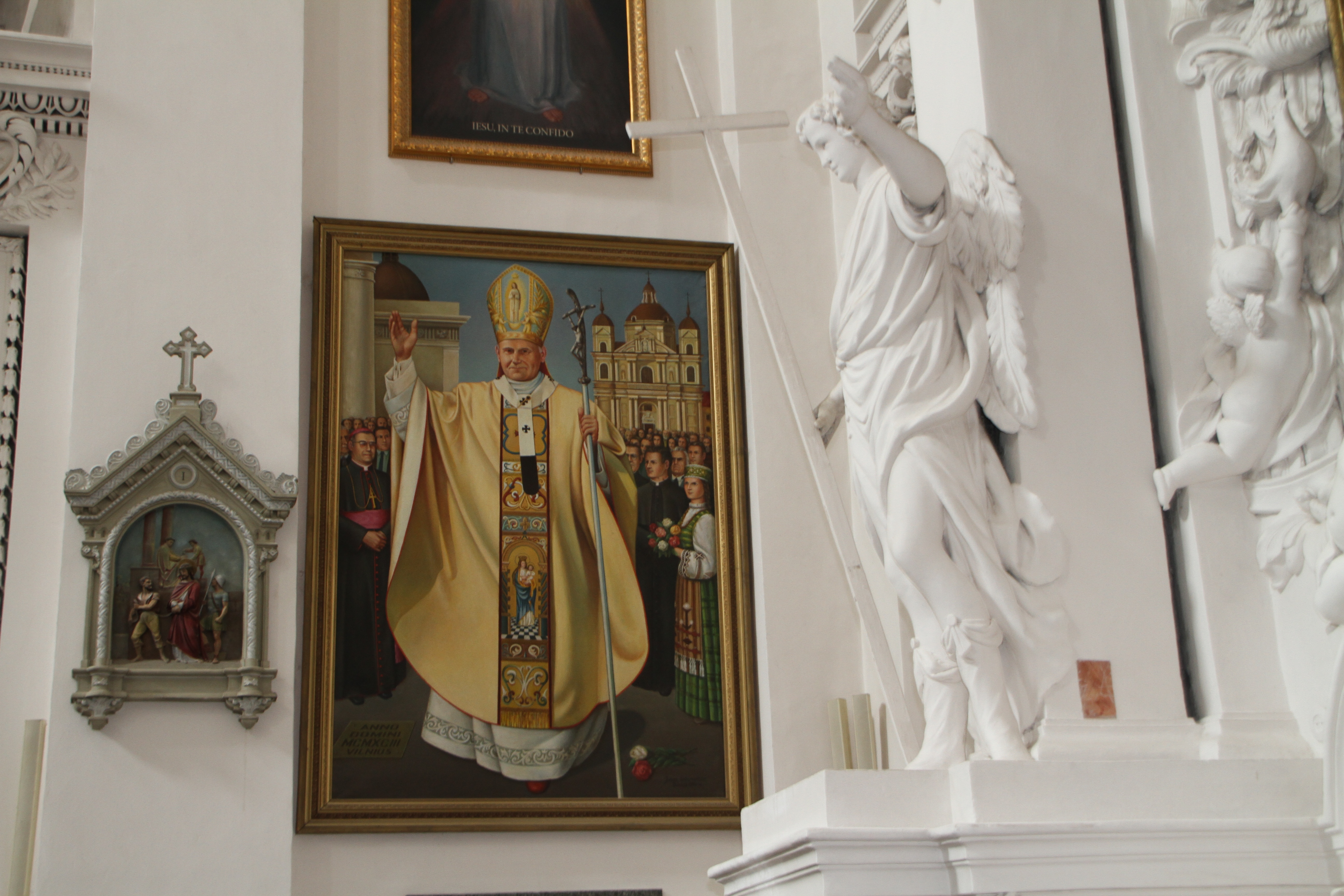 Gemälde in einer der 13 Seitenkapellen